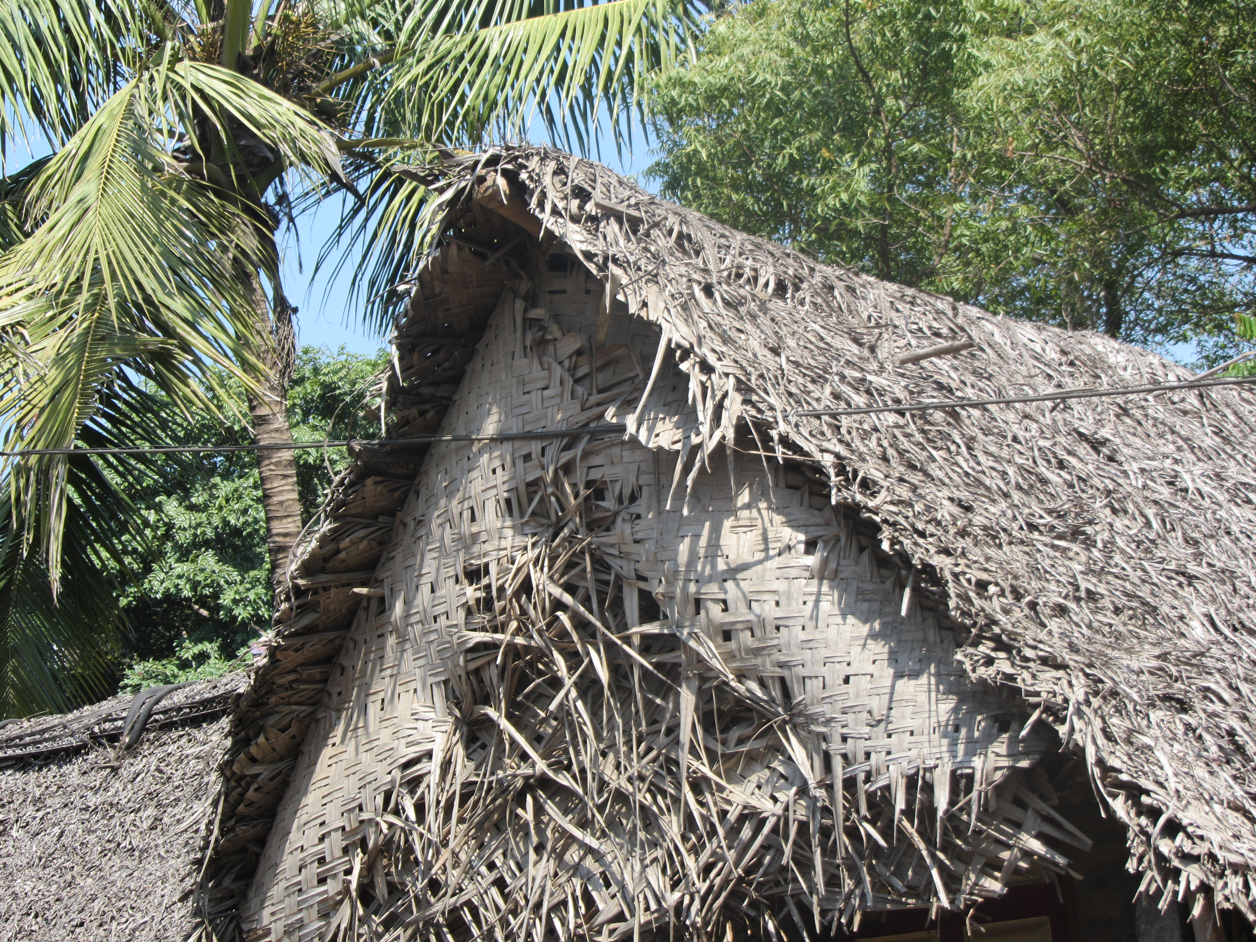 இந்தியாவில் கீற்றுக் குடிசை. ஏழைபாழைகளின் இல்லம்.